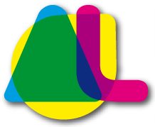 2013ko Ibilaldiaren logoa.